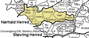 Nørhald Herred - Gl. Randers Amt, Denmark.